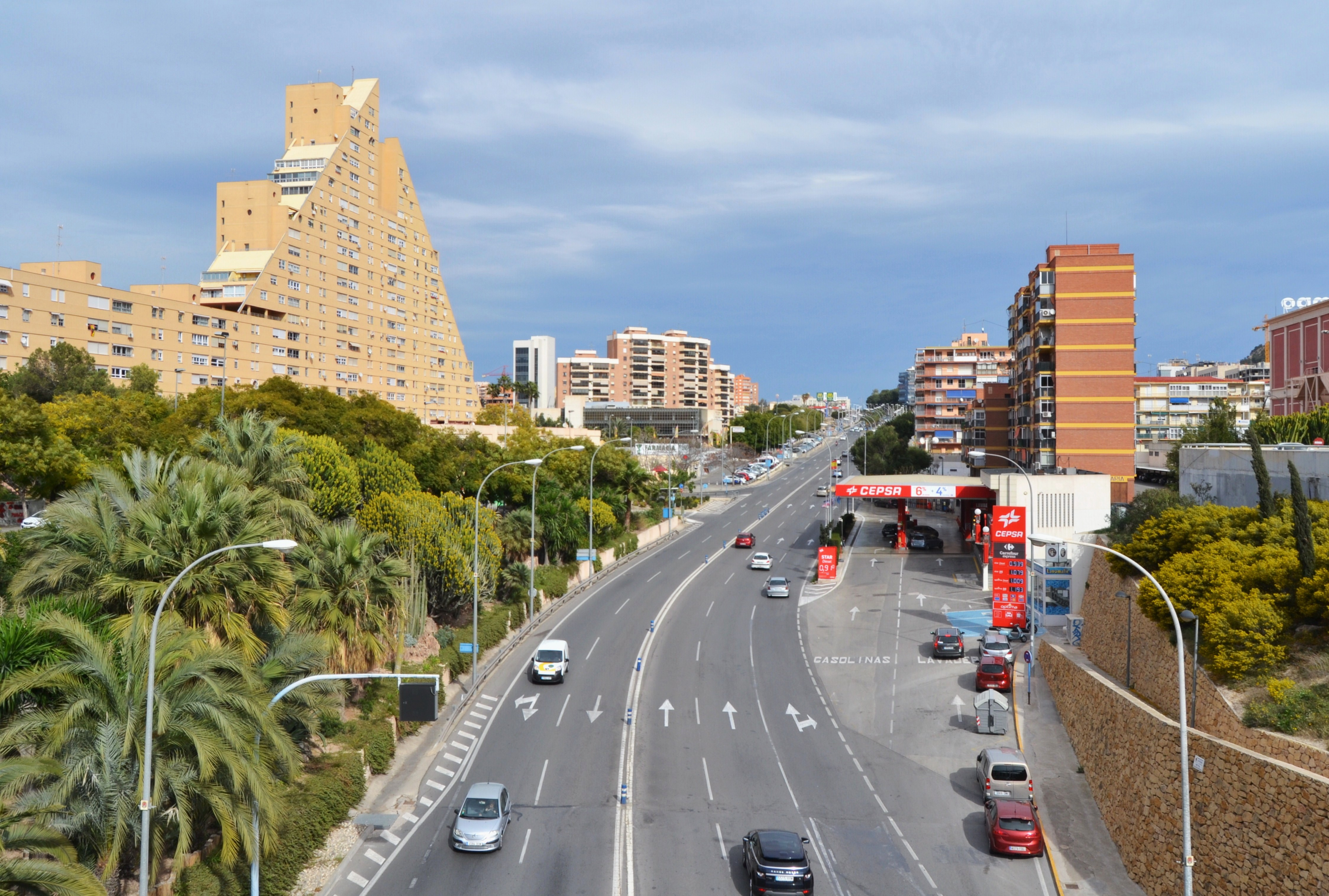 Avinguda de Dénia d'Alacant.